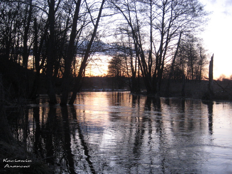 Беларуская (тарашкевіца): Рака Гайна ў вёсцы Гасьцілавічы